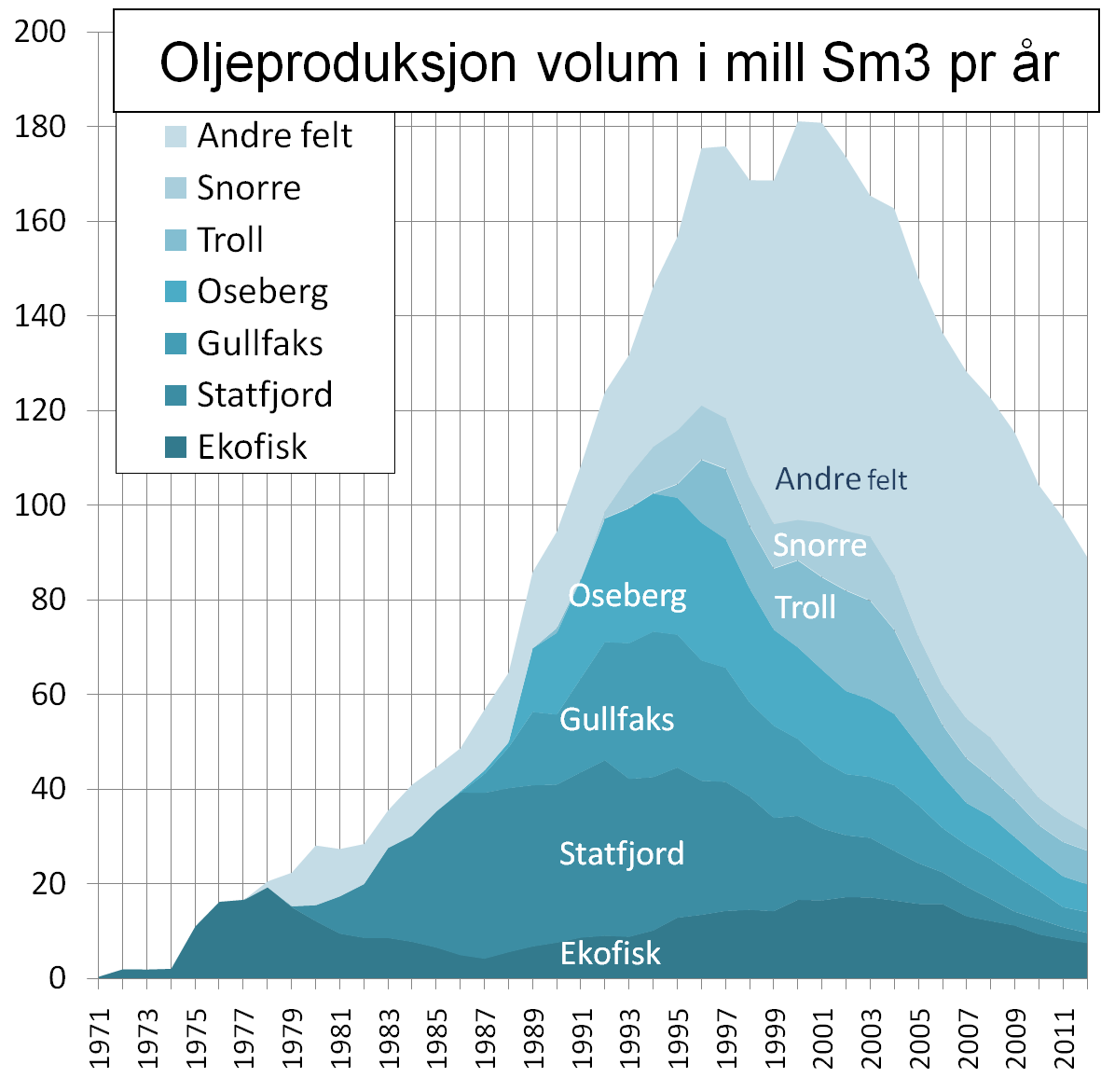 Skildring: Petroleumsverksemda i Noreg: Norsk oljeproduksjon volum pr år i perioden 1971 til og med 2012. Eining er millionar standardkubikkmeter pr år. Grafen viser tilskot frå dei 6 felta som tidleg har hatt størst produksjon og ein samlebolk for alle andre. Grafen gjeld berre oljeproduksjonen og tar ikkje med naturgass, ngl eller kondensat. Kategorien andre: I 1980 var andre felt som produserte olje: Albuskjell, Cod, Edda, Eldfisk, Tor og Vest Ekofisk. I 2009 var "Andre" 64 mindre og større felt med total årsproduksjon på 69,63 Sm3.